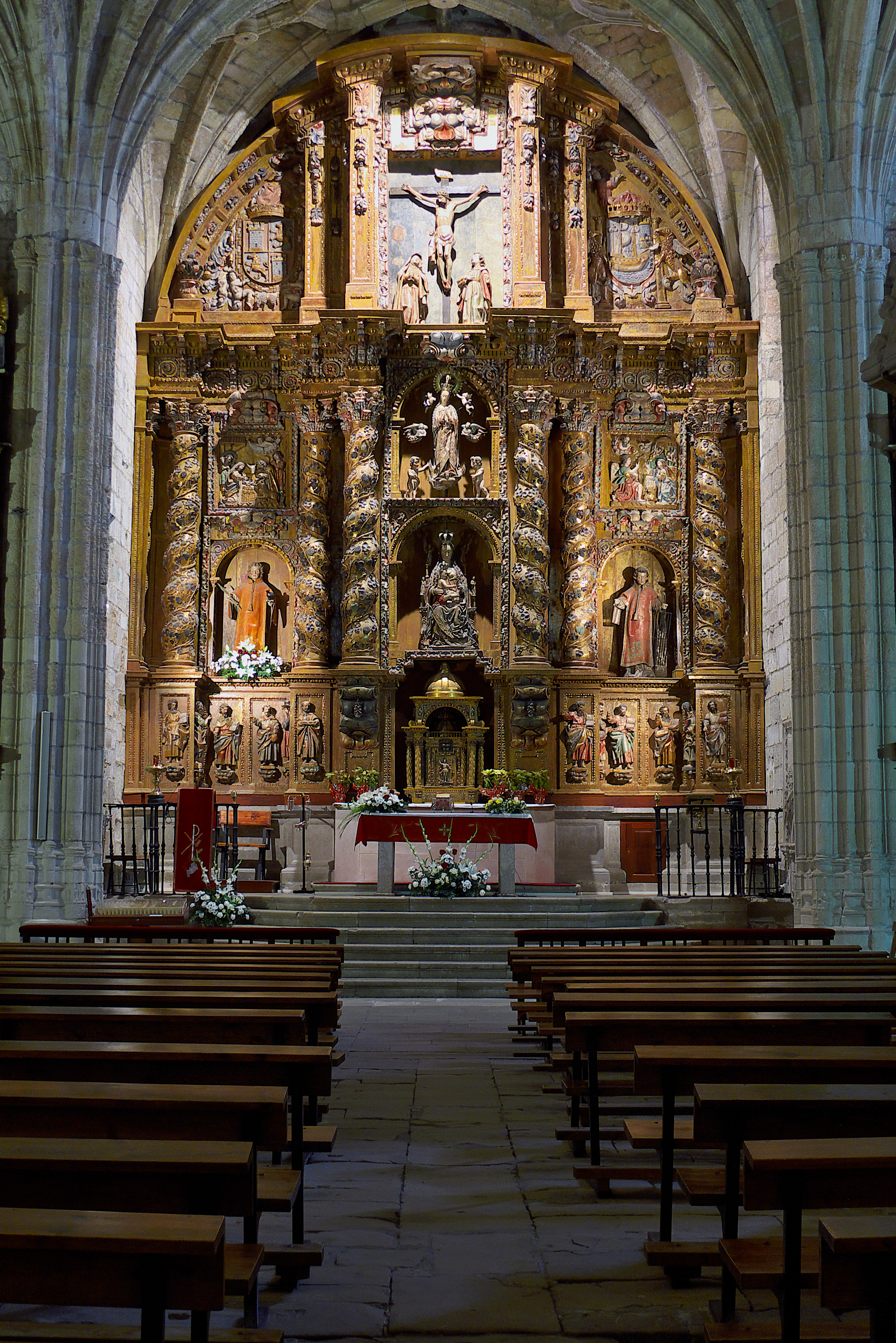 Pedro de la Puente Tolnado lo ejecuta entre 1675 y 1680, apuntando al estilo churrigueresco. Las imágenes de la Virgen datadas en fechas anteriores, tardogóticas, procedentes del anterior retablo. Sobre 1691-1693 es dorado por Simón de Haro.